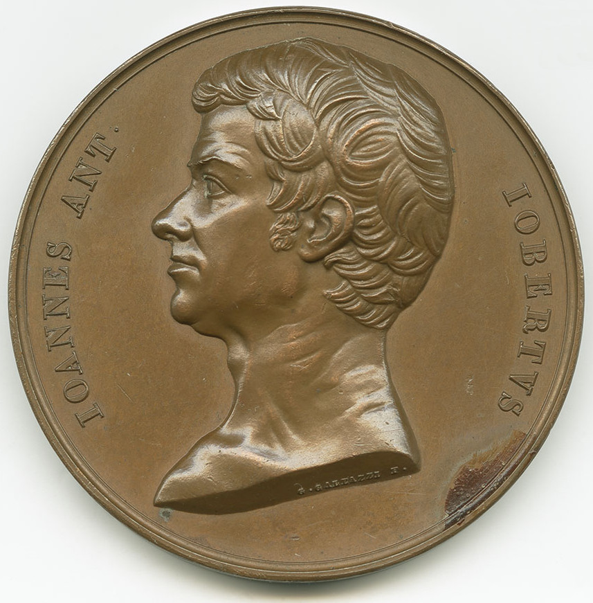 Vorderseite einer Medaille von Galeazzi mit dem Bildnis G. A. Gioberts; Umschrift: IOANNES ANT. IOBERTVS (Revers: ARTES CHEMIAE OPIBVS AVXIT)